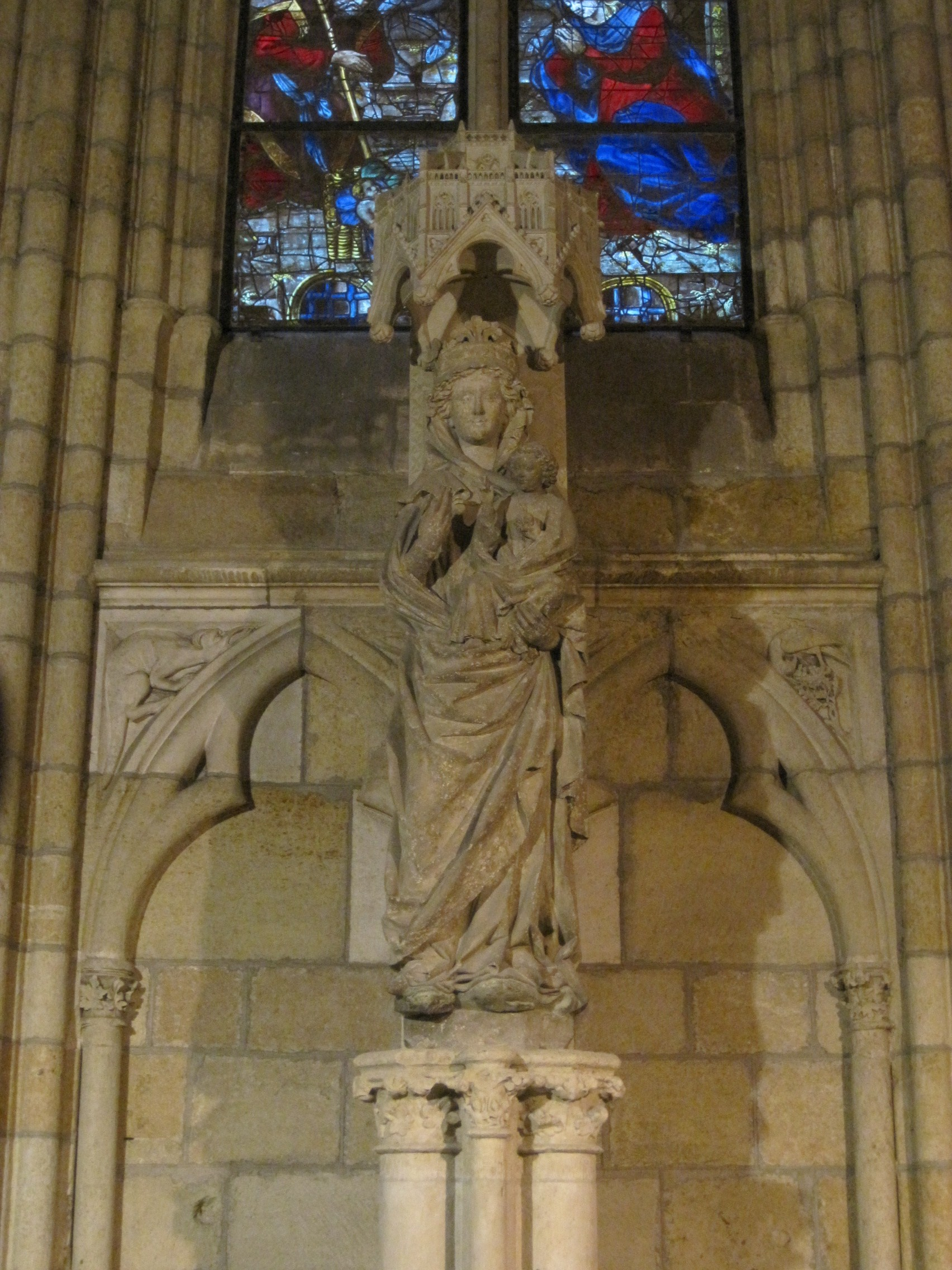 Escultura de la Virgen Blanca, catedral de León (España).